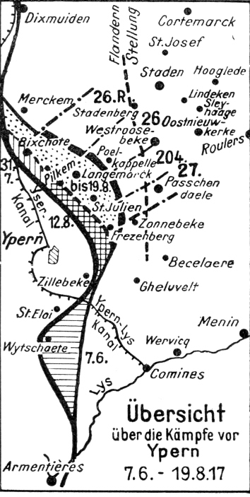 Karte: 240. Inf.Div. 7.6.-18.8.1917 vor Ypern